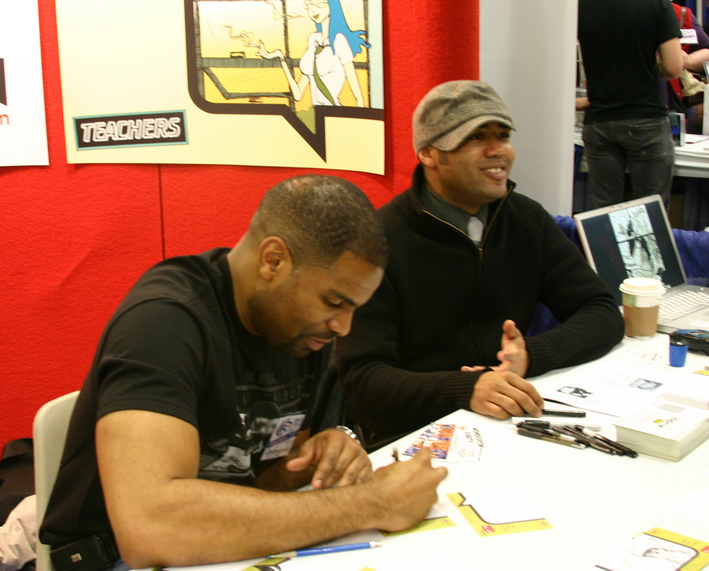 Jeremy Love and Kwanza Johnson